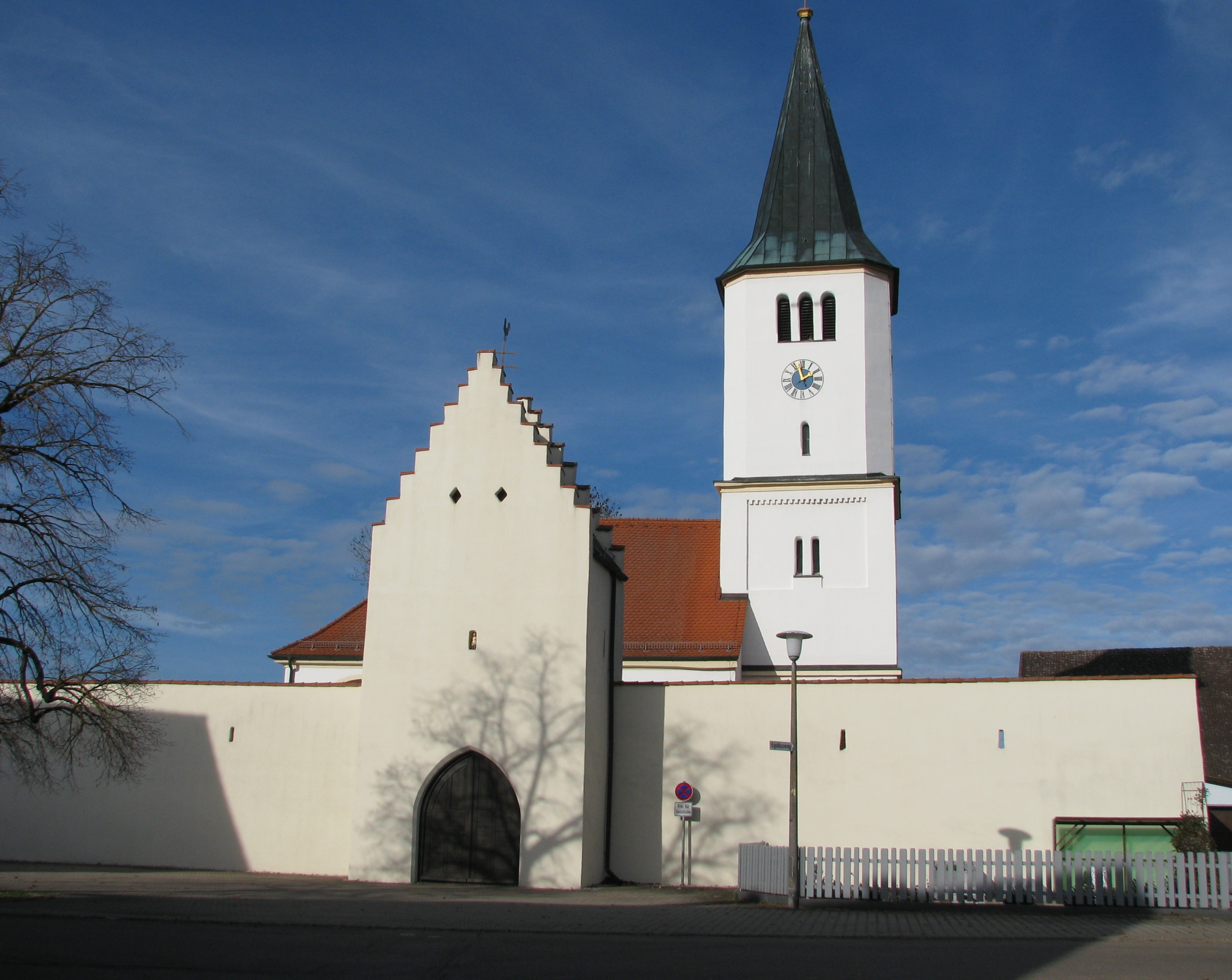 Röckenhofen, Ortsteil von Greding im mittelfränkischen Landkreis Roth in Bayern, Wehrkirchenanlage St. Ägidius